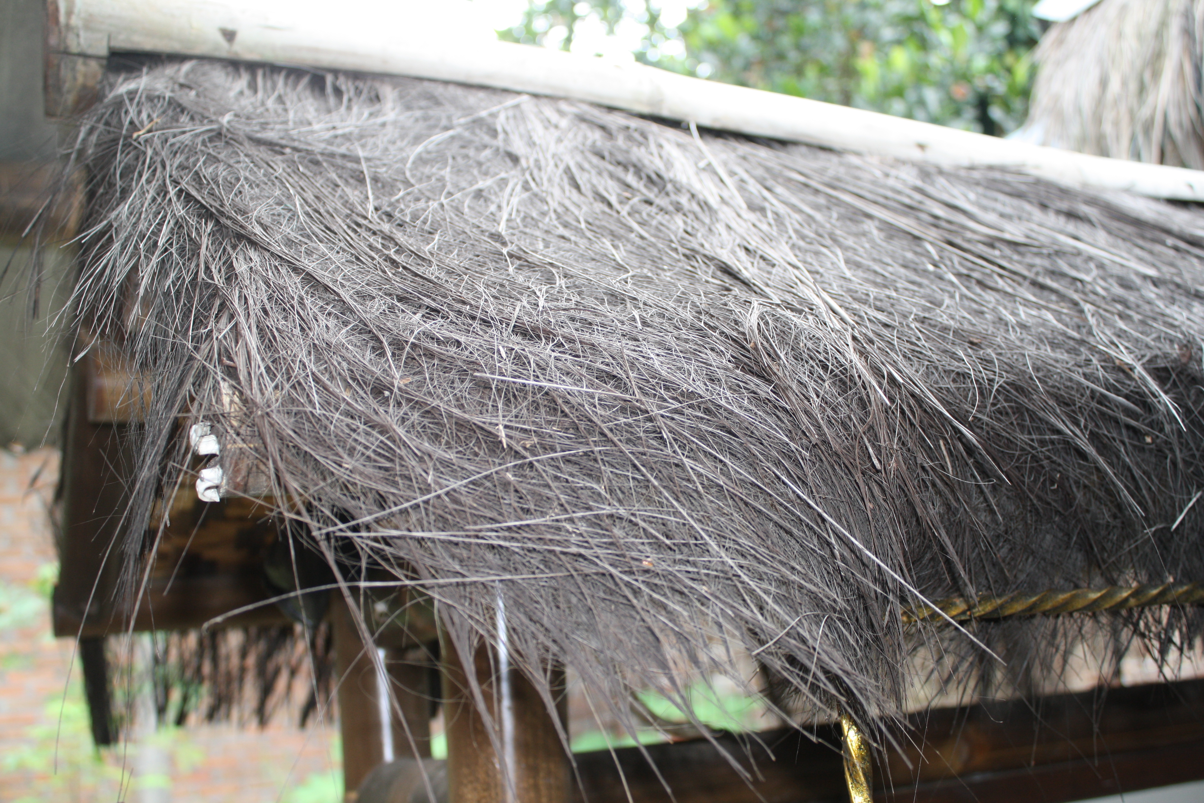 Atap gasebo yang terbuat dari ijuk